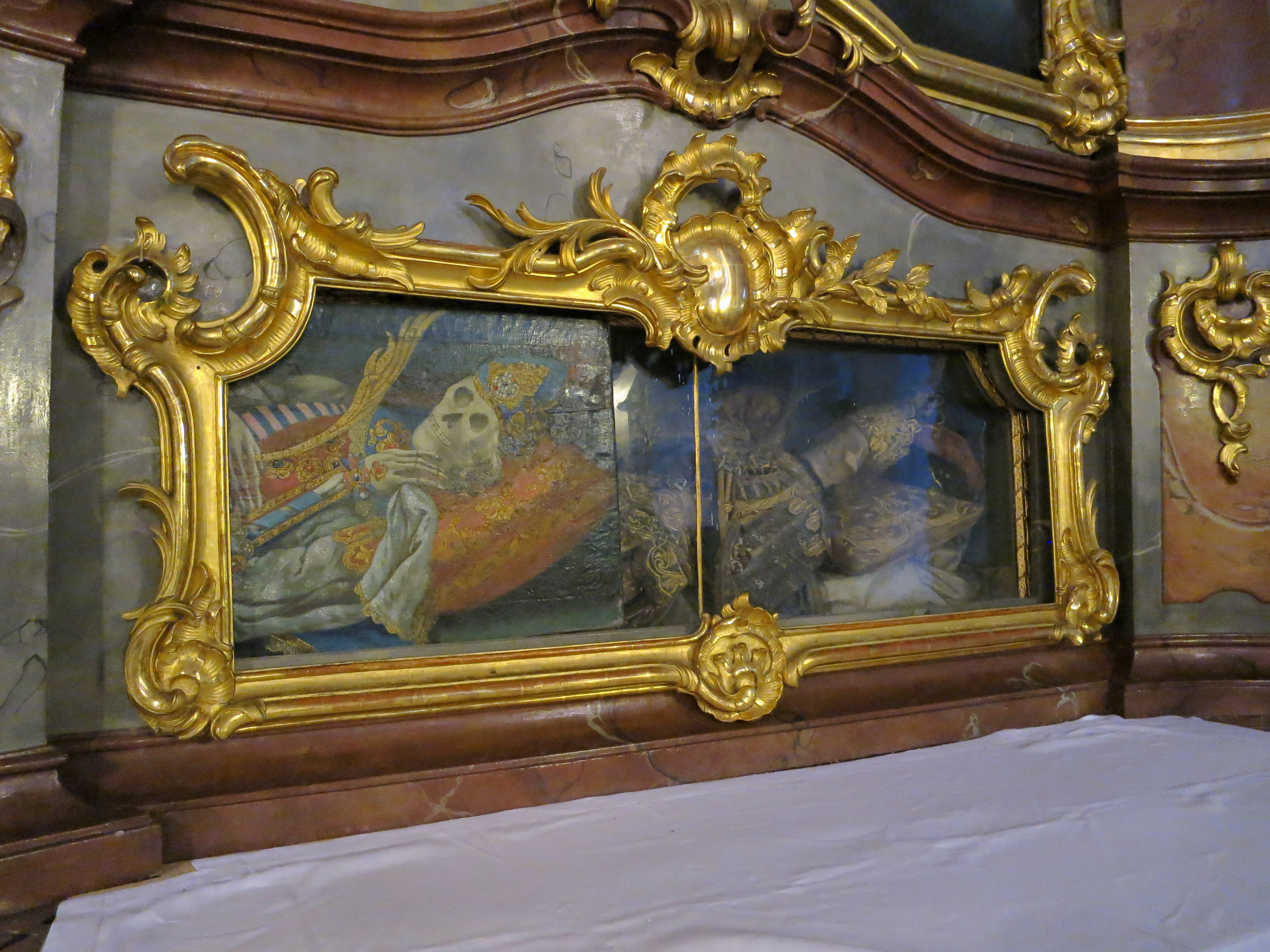 Reliquie im Schaugrab mit Blende